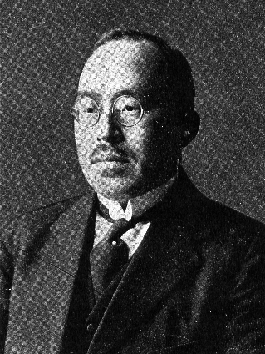 この写真は、藤沼庄平（1883-1962）の写真です。